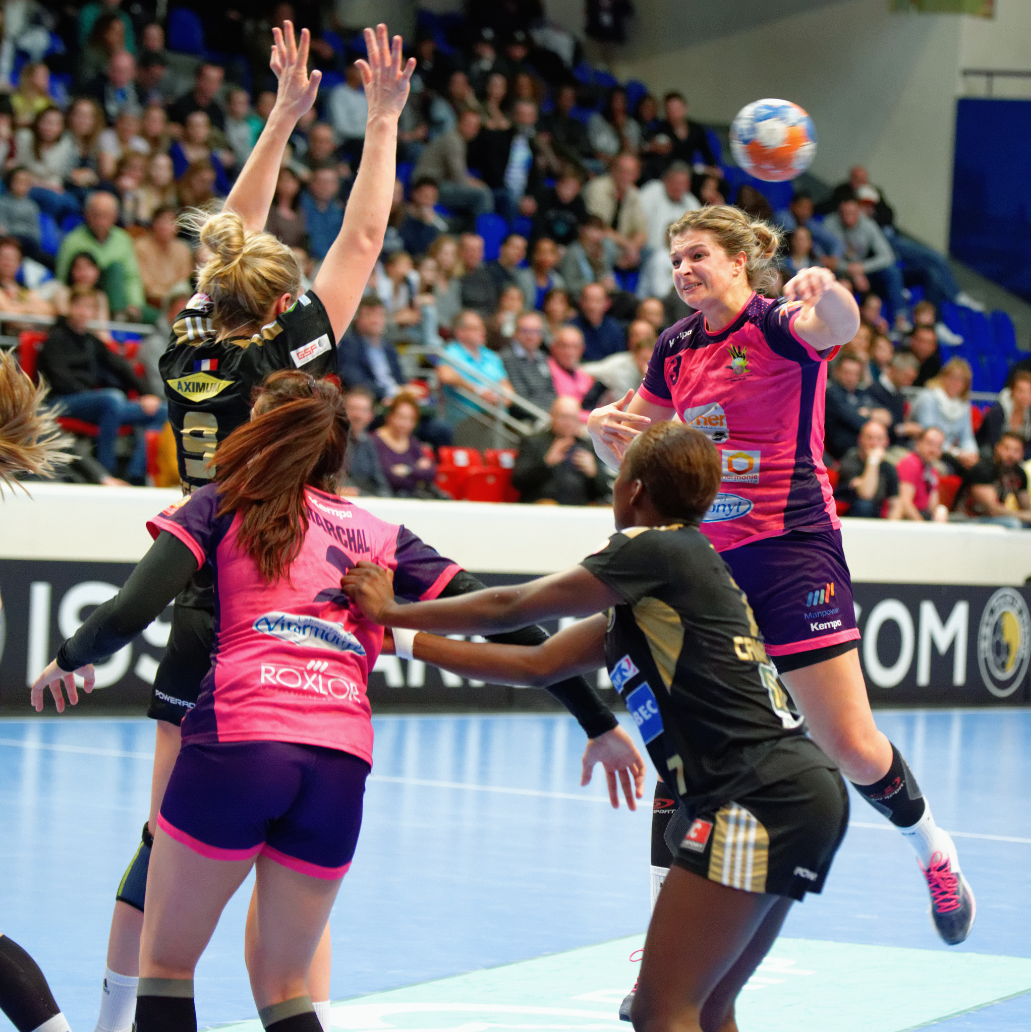 Marie Prudhomme Lors du match retour des playoffs Issy Paris Hand / Nantes LAHB, le 17 avril 2016 à Coubertin (Paris).